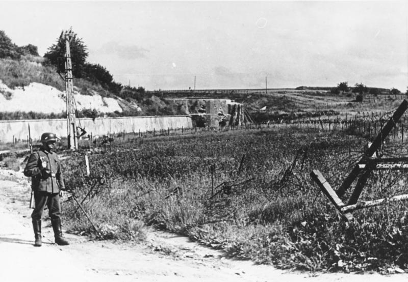 Belgien. Eben Emael Haupteingang des Forts Eben Emael. Mai 1940